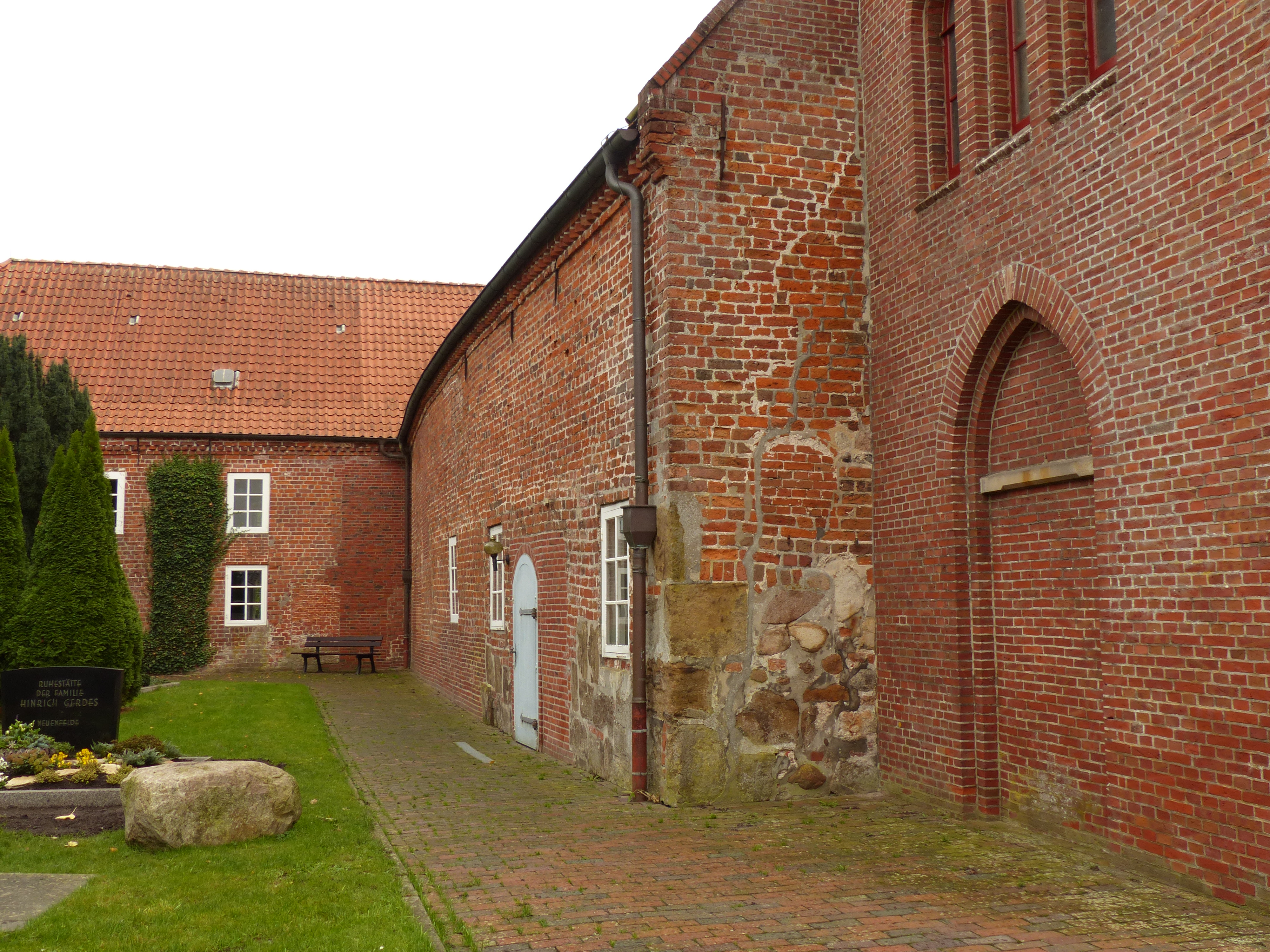 St.-Nicolai-Kirche in Elsfleth: rechtgs Nordseite von Turm und Westflügel (altes Schiff), hinten Ostflügel (neues Schiff) von Westen